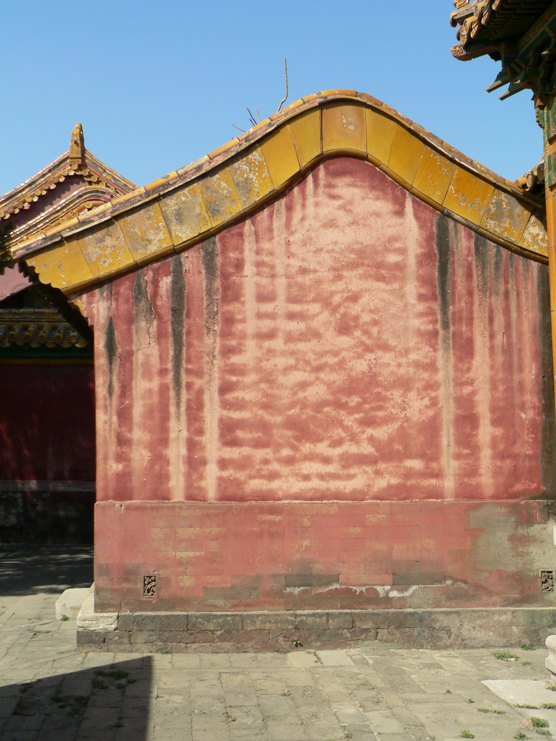 硬山顶